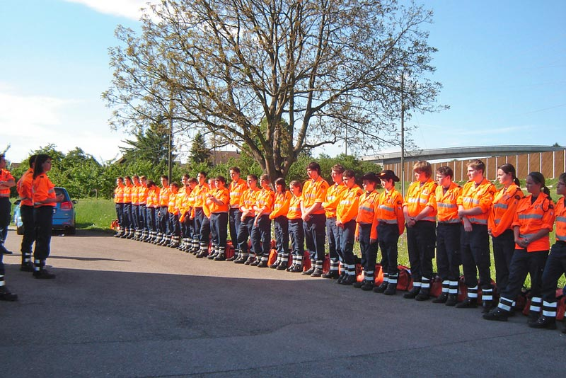 VK-Albis am Briefing